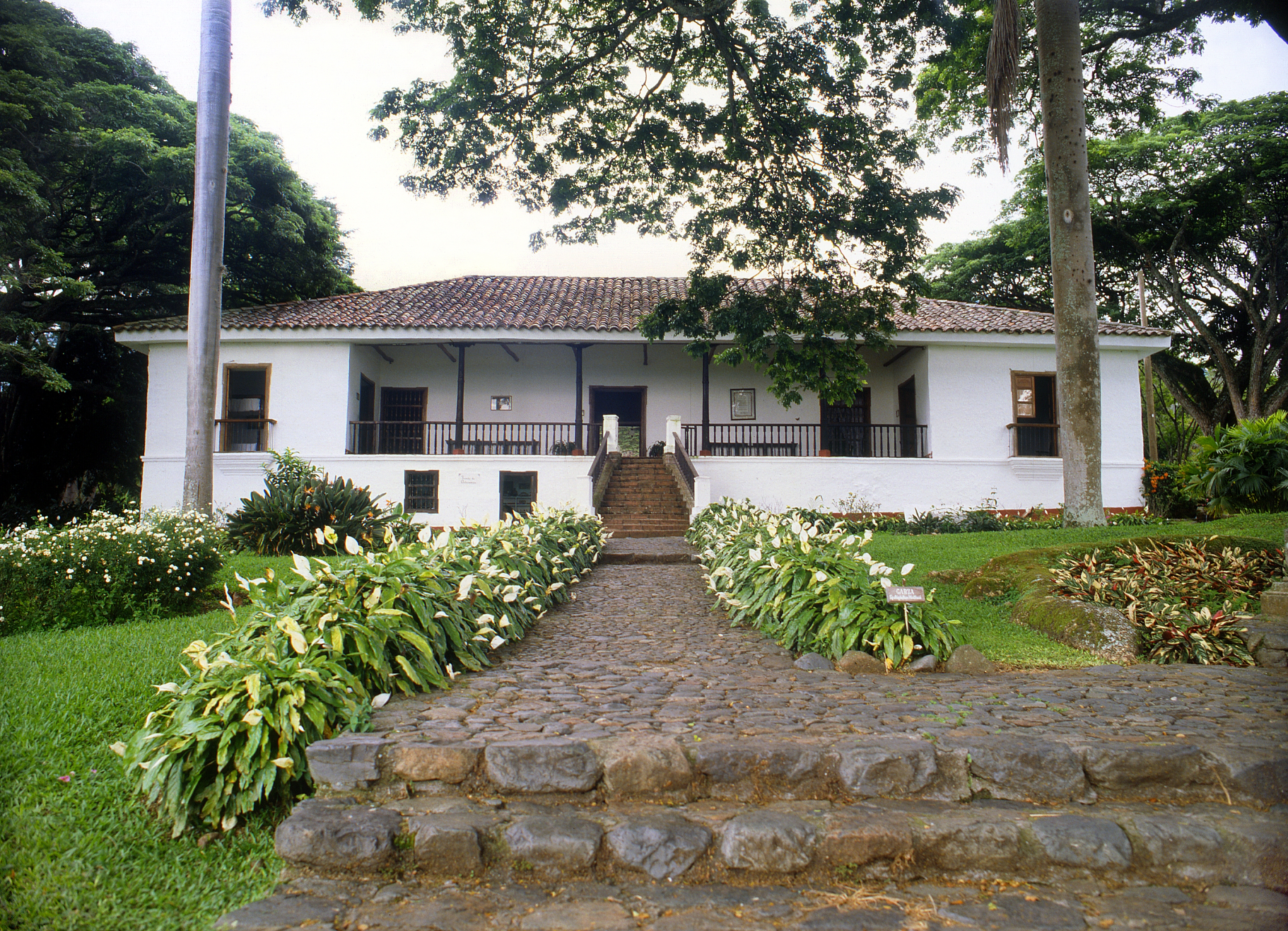 Immagine della Hacienda el Paraiso a El Cerrito Imagen de la Hacienda el Paraiso a El Cerrito